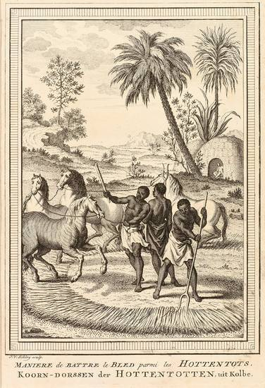 Manière de battre le bled parmiles Hottentots, copperplate engraving by Jakob van der Schley, Amsterdam, "uit Kolbe", from the book by Peter Kolbe, probably 'Naaukeurige en uitvoerige Beschryving van de Kaap De Goede Hoop; Behelzende Een zeer omstandig Verhaal van den tegenwoordigen toestant van dat vermaarde Gewest, deszelfs Gelegenheit, Haven ..' by Peter Kolbe, published in Amsterdam by Balthazar Lakeman 1727.